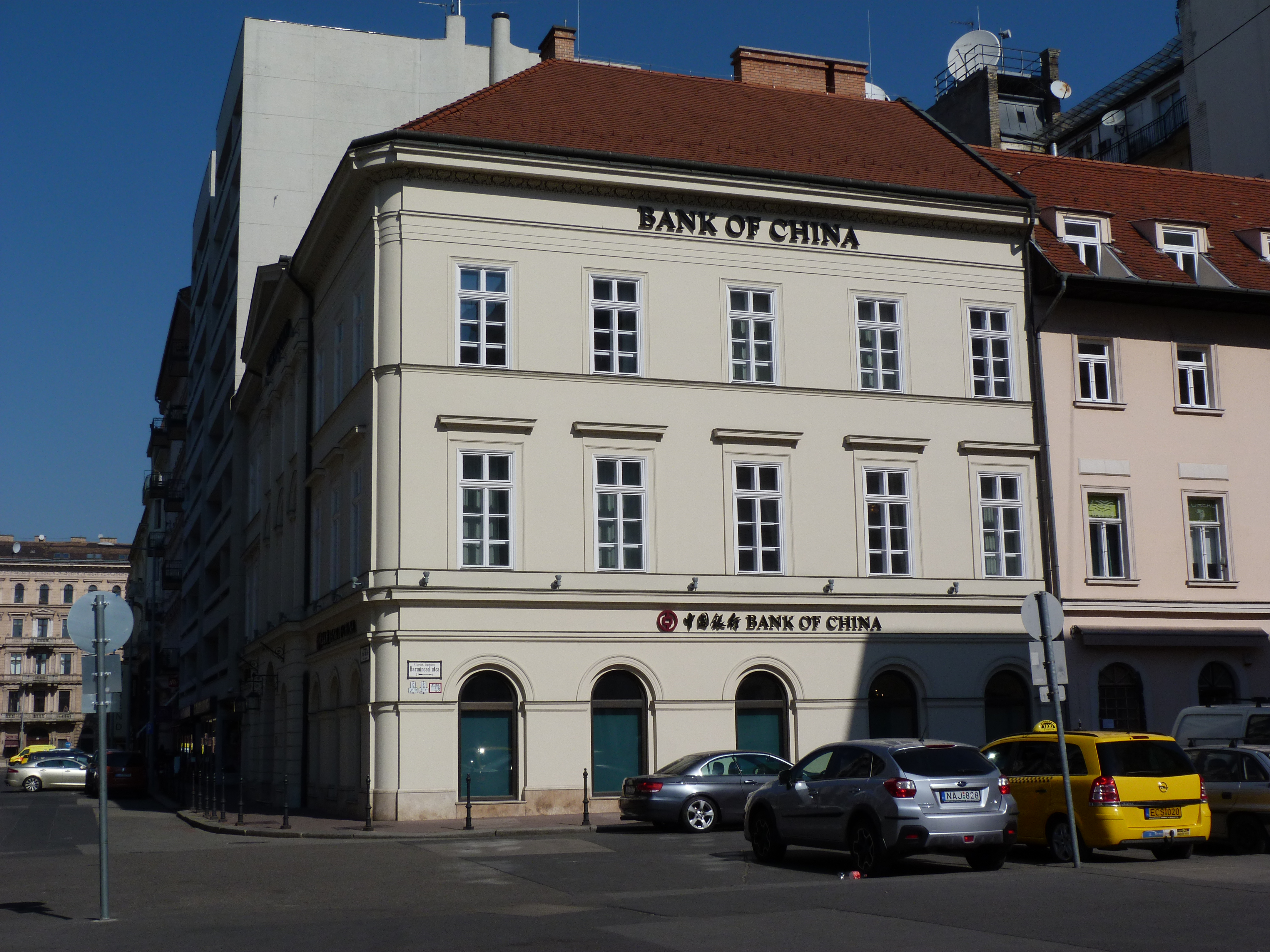 A felvétel 2015. március 19-én csütörtökön készült Budapesten, József nádor tér, 7 (Harmincad utca 2)